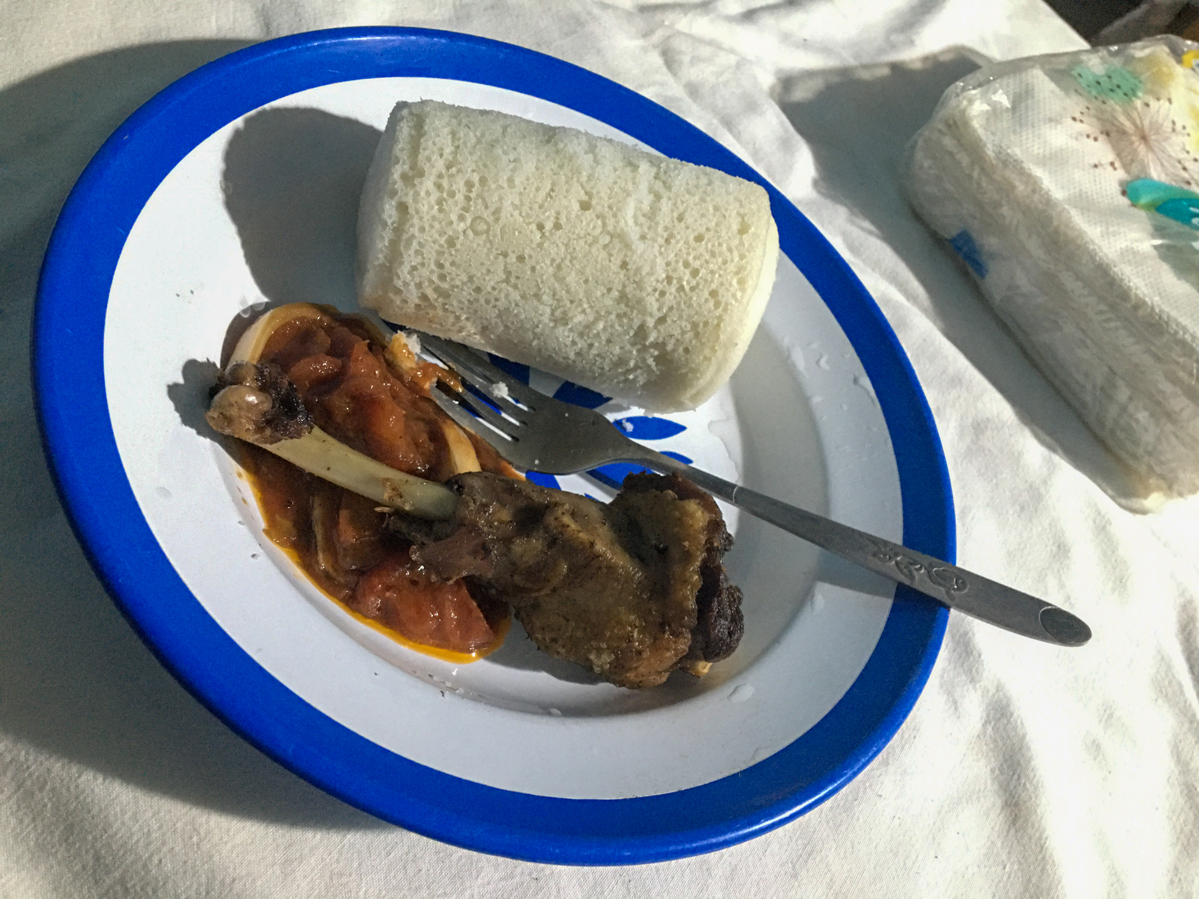 Péhunco - Un plat de Ablo